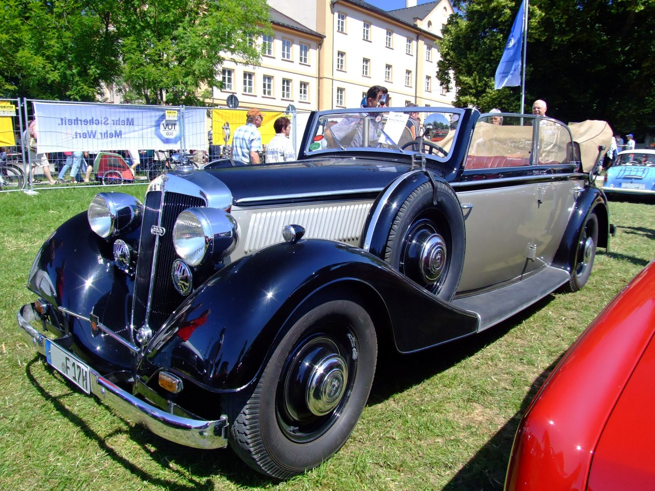 Quelle: selbst fotografiert, 06/2007 Fotograf: Späth Chr.